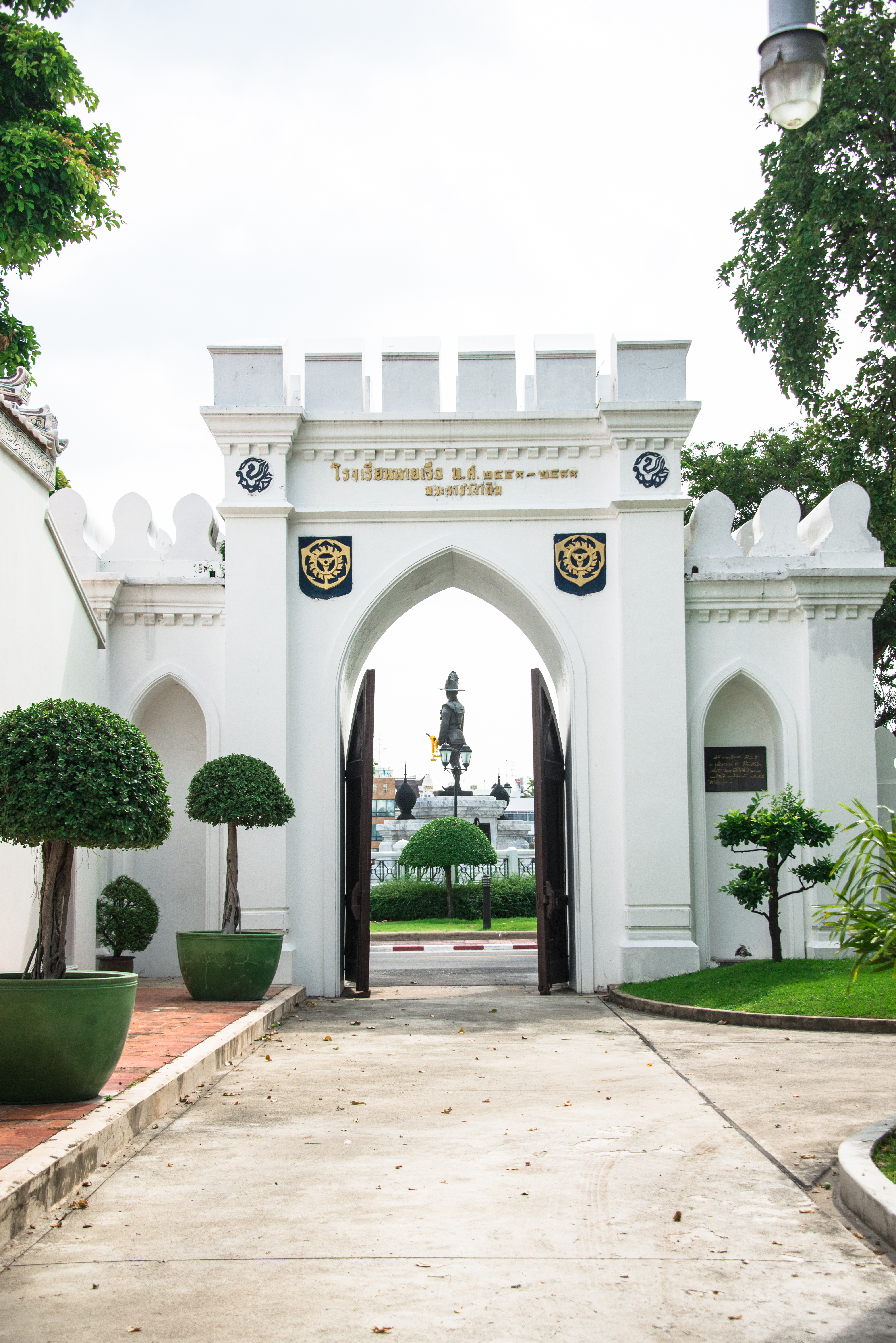 พระราชวังเดิม